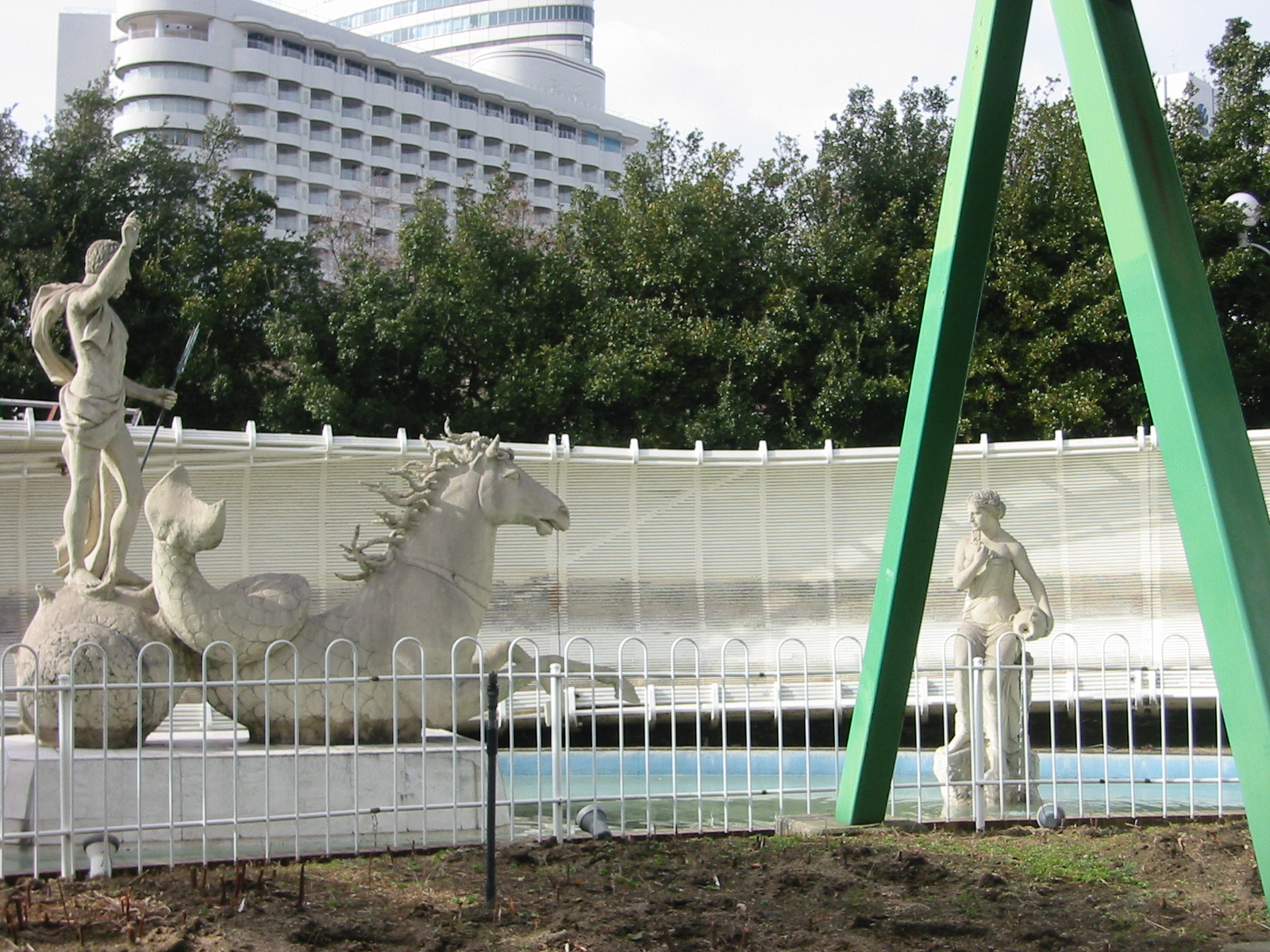 神戸ポートピアランド 何の像?不明 ドイツのマック社と共同開発した日本初のスライディングコースター・ミュンヘンアウトバーン下にて Kobe Portopia Land on Port Island, disassembled in August 2006